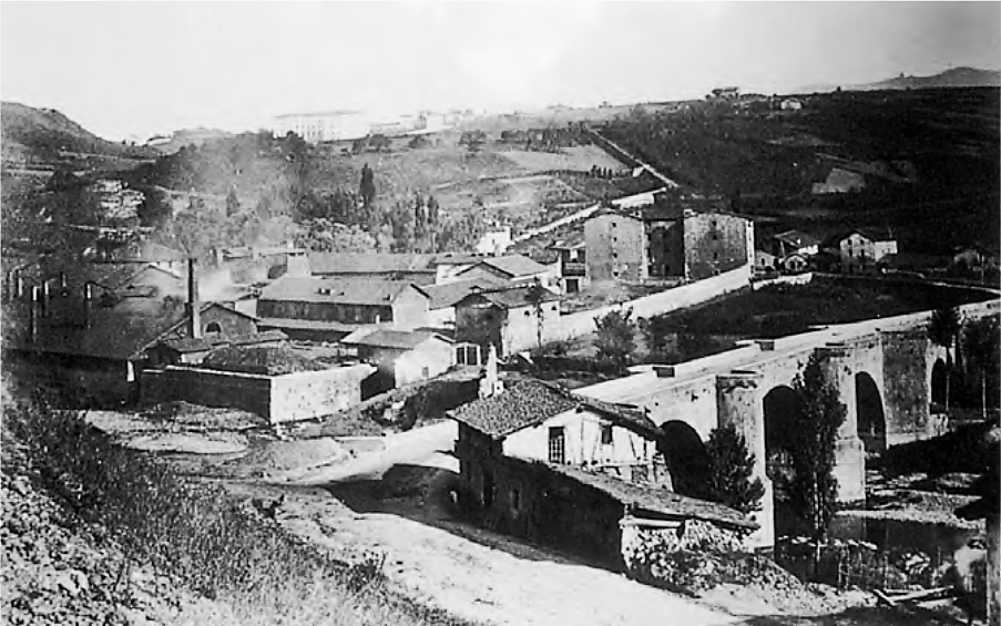 Santa Ana de Bolueta c 1860